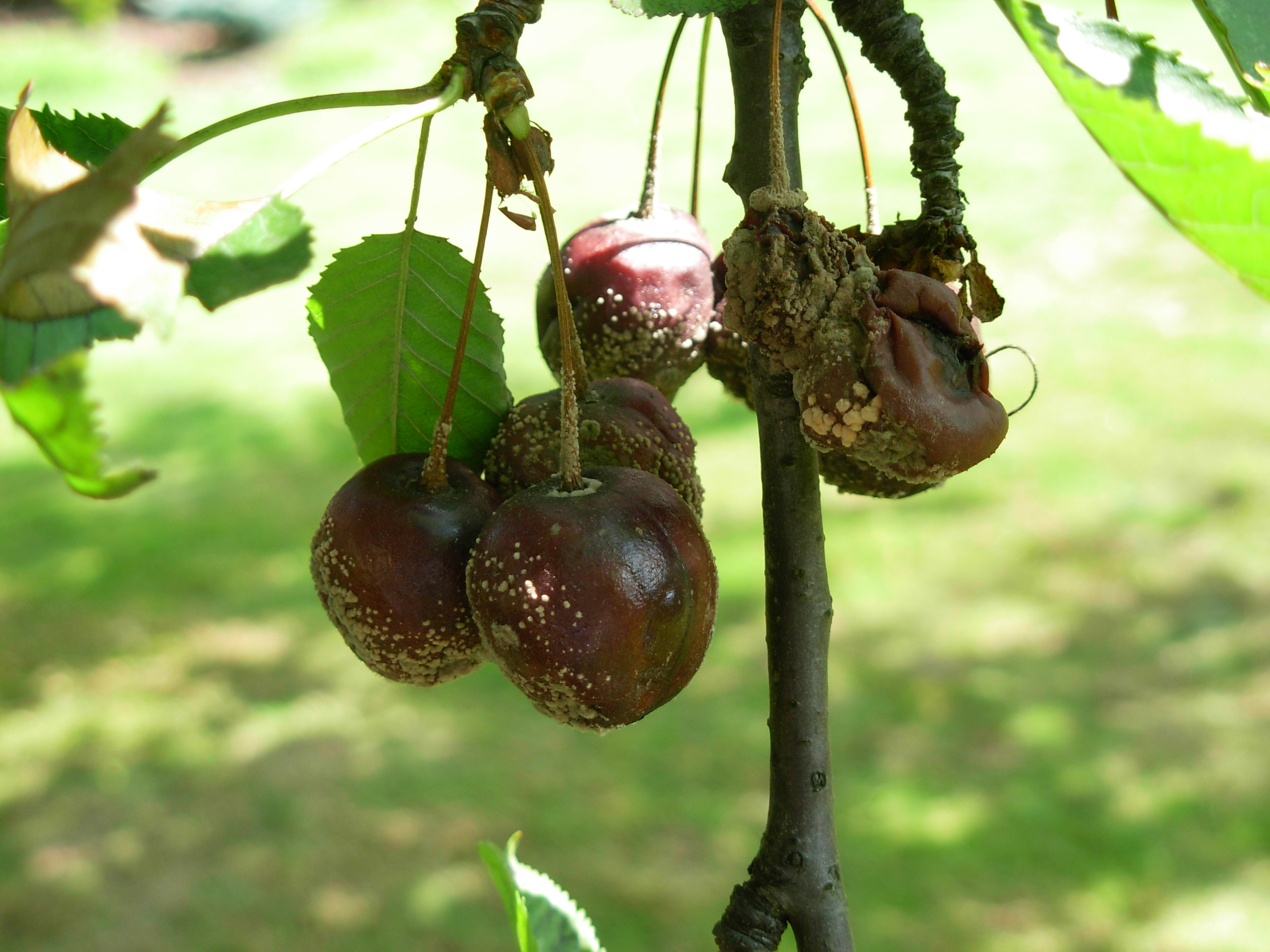 (fr) Moniliose, Monilia laxa, sur cerise (en) Monilia laxa on cherry